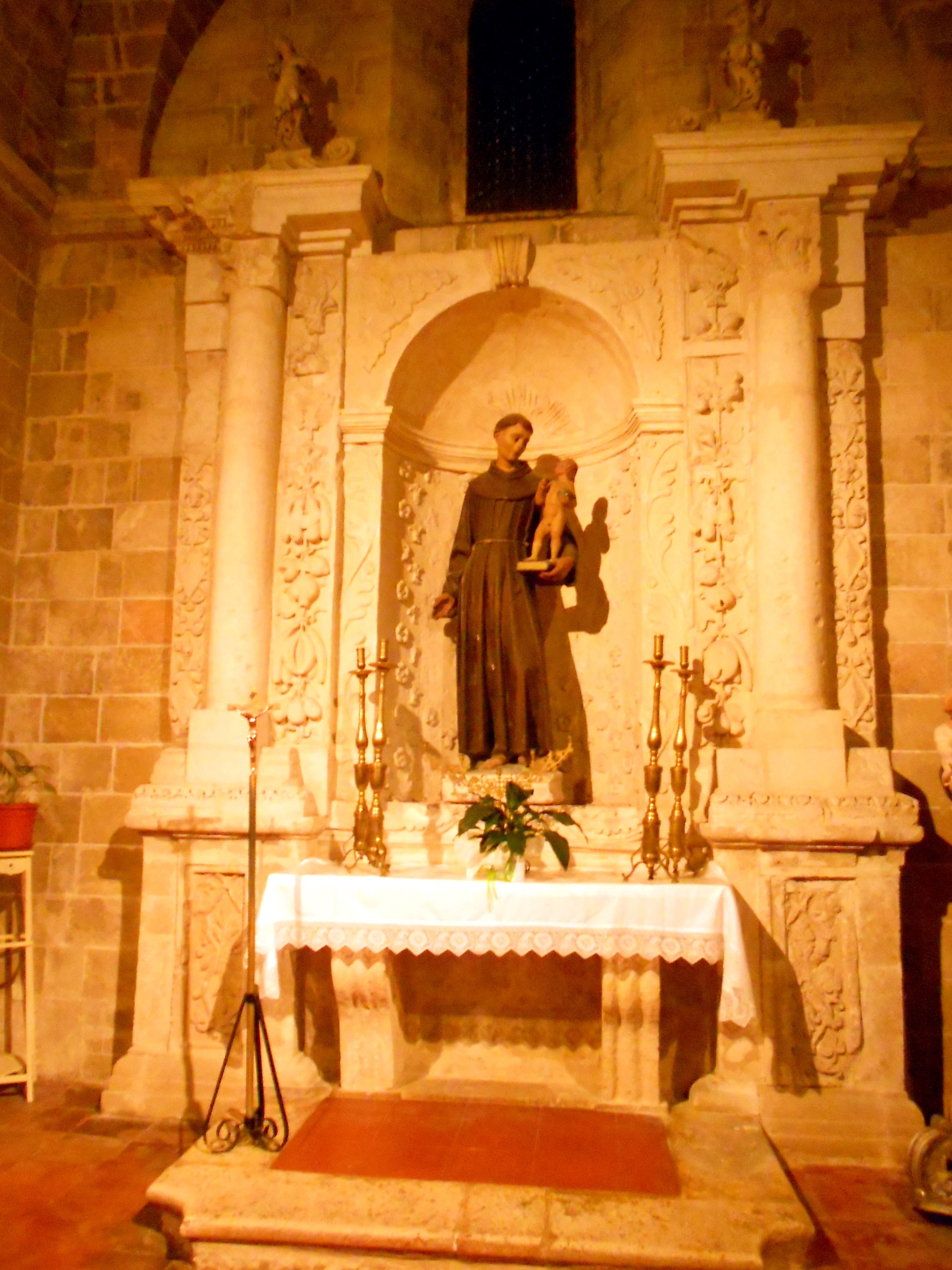 Altare Sant'Antonio, convento di Maruggio